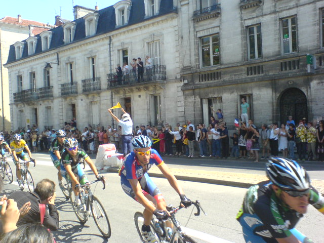 Passsage du peloton du Tour de France à Périgueux